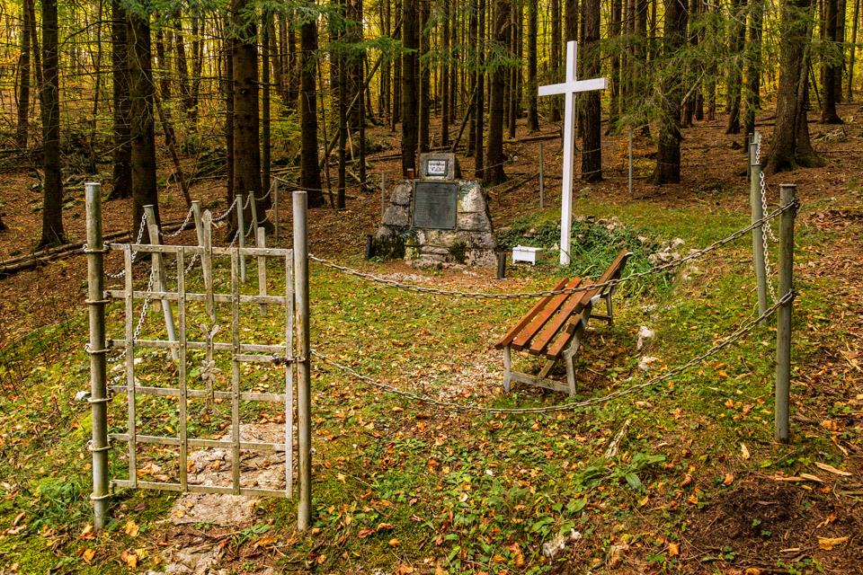 Podlomske žrtve spomenik koji se nalazi na cesti Veprinac-Račja Vas poviše Lanišća